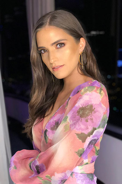 Evento privado realizado en la ciudad de Guayaquil en el año 2019.